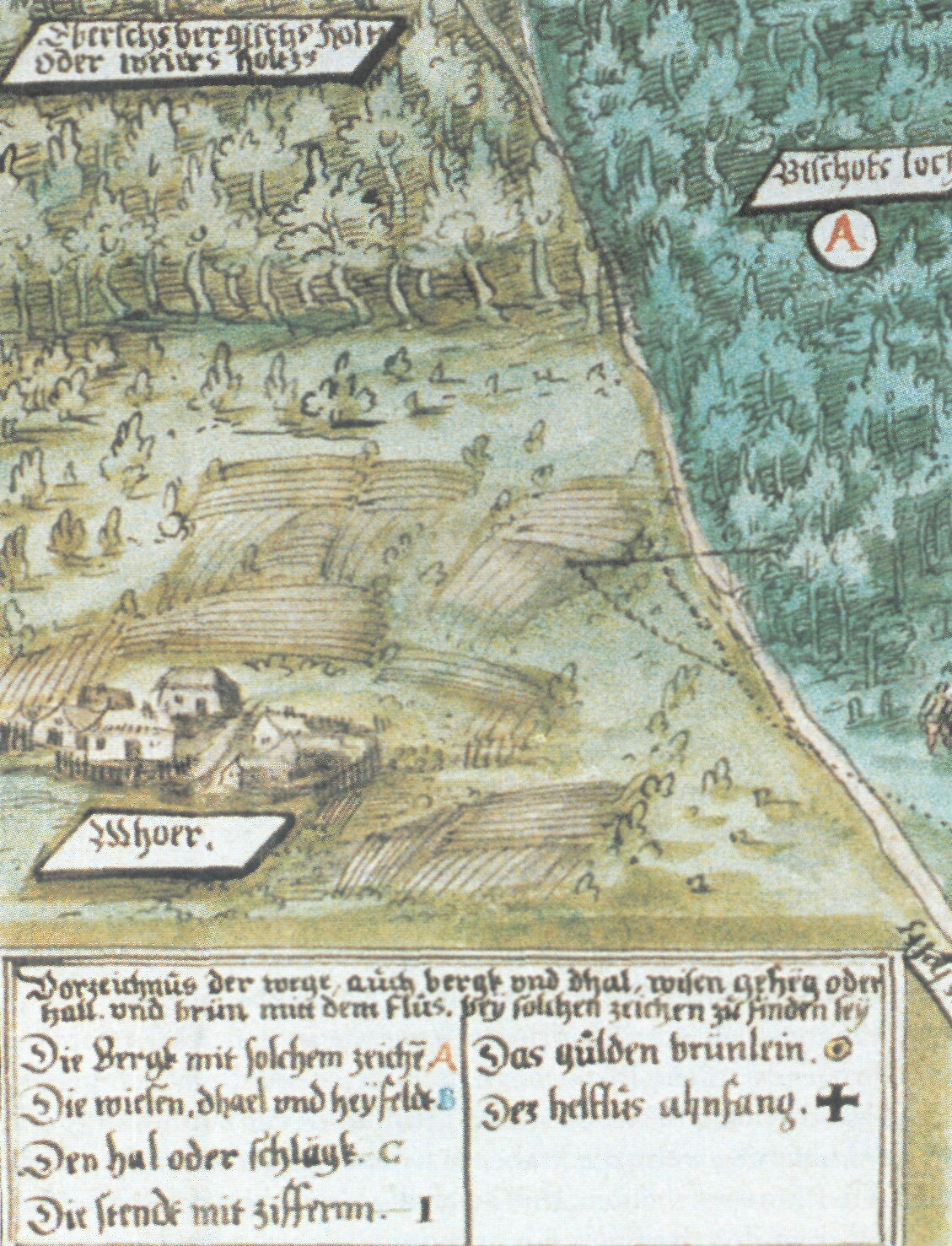 Karte (Ausschnitt) vom Dorf Rothenmohr beim Roten Moor, aus dem Jahre 1584